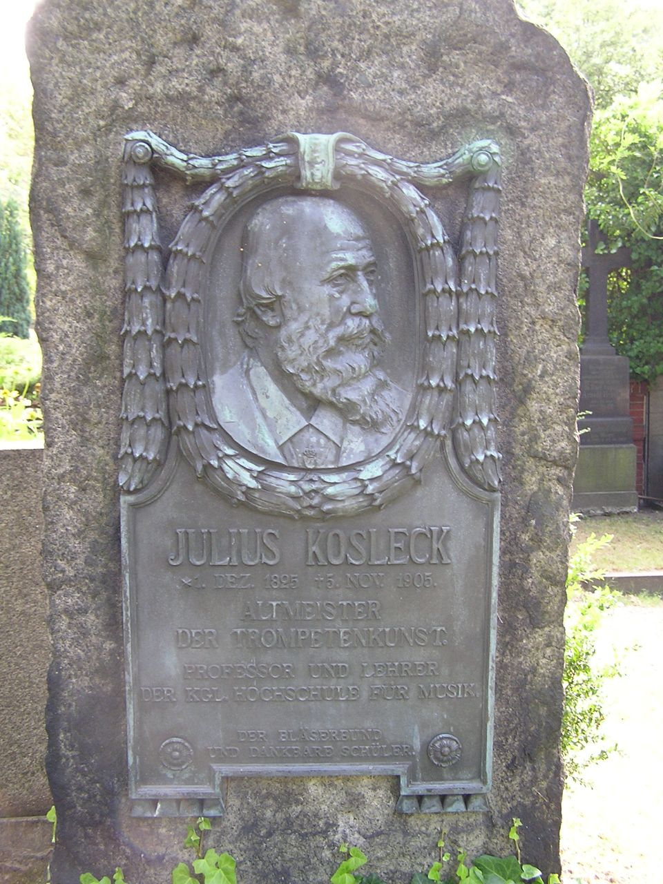 Kirchhof Alt-Schöneberg, Grab Julius Kosleck